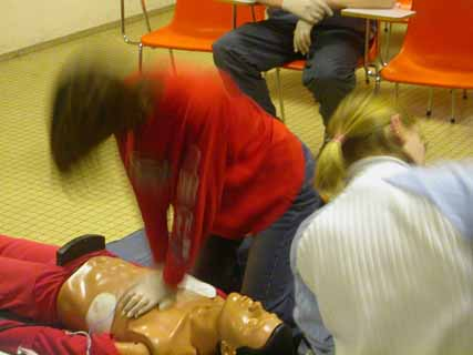 Massage cardiaque ; photo prise lors d'une formation CFAPSE Photo prise par szdavid ; image dans le domaine public avec accord de l'auteur.